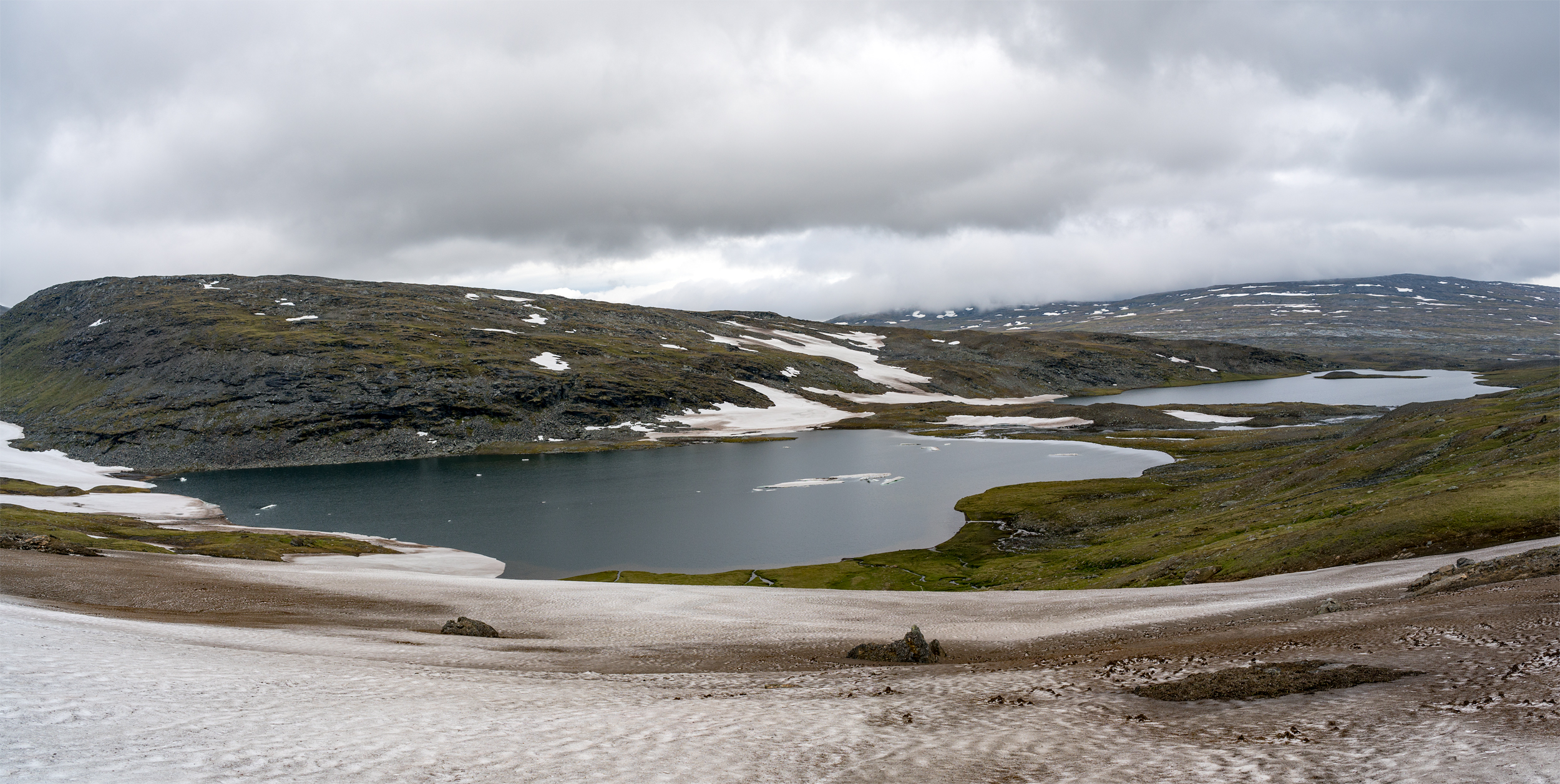 Skiejákjávrásj närmast och Tjåggnårisjávrás längre bort. Vy mot väster.